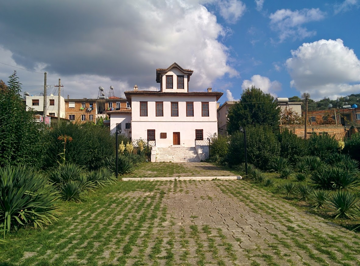 Ndertesa Ku U Mbajt Kongresi I Lushnjes